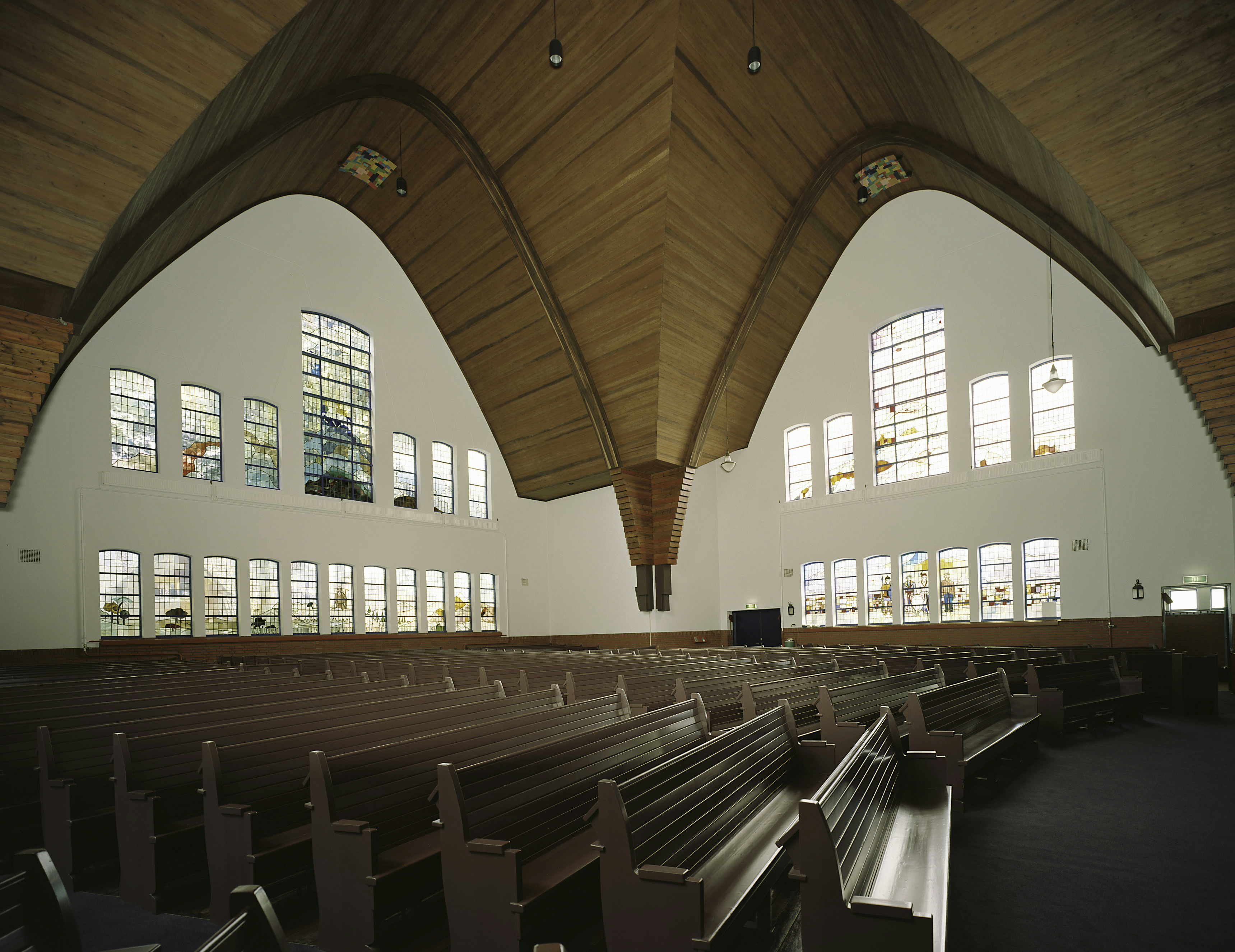 Gereformeerde Goede Herderkerk: Interieur, richting achterzijde met gebrandschilderde ramen